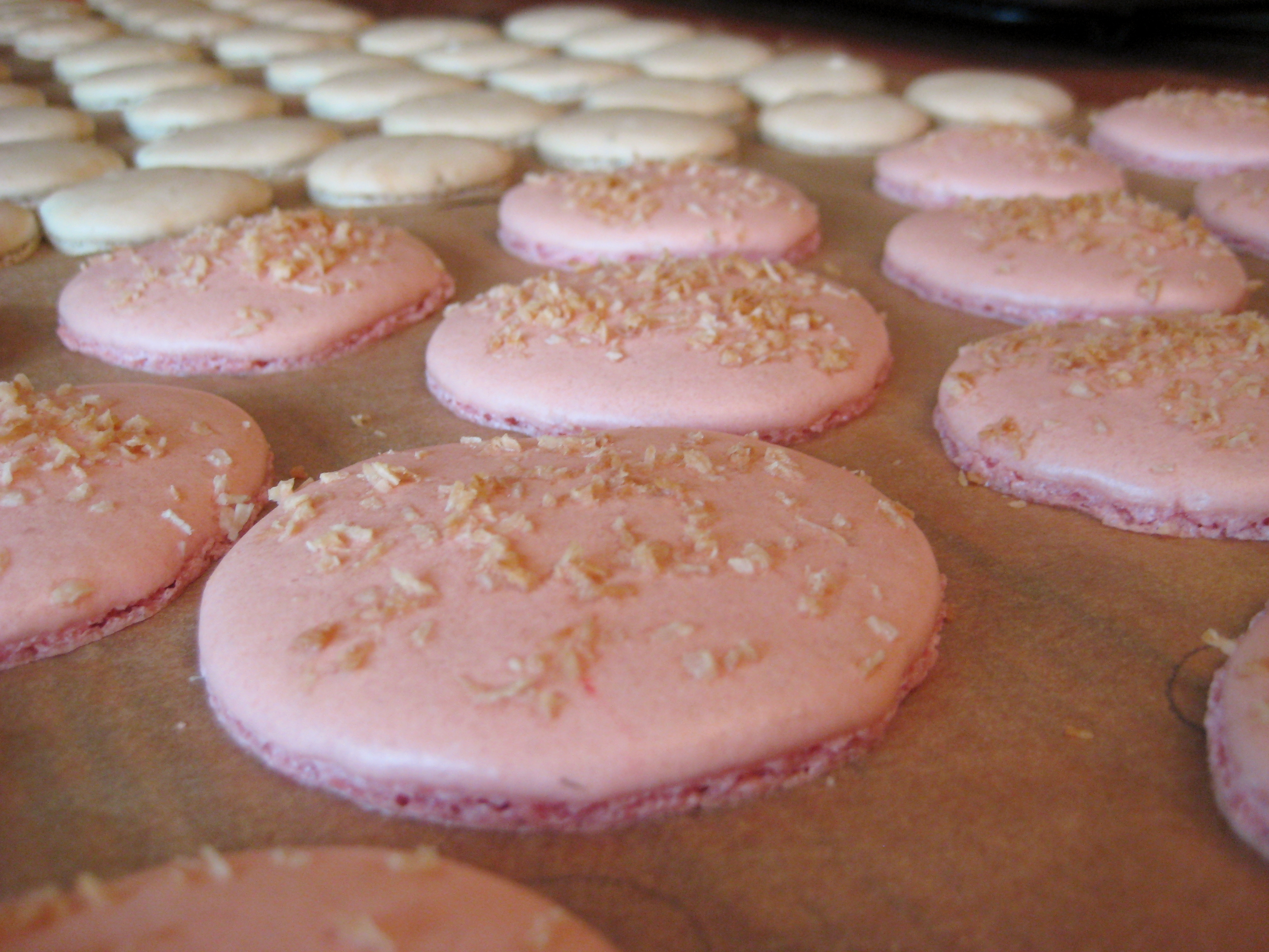 Valentine macarons!